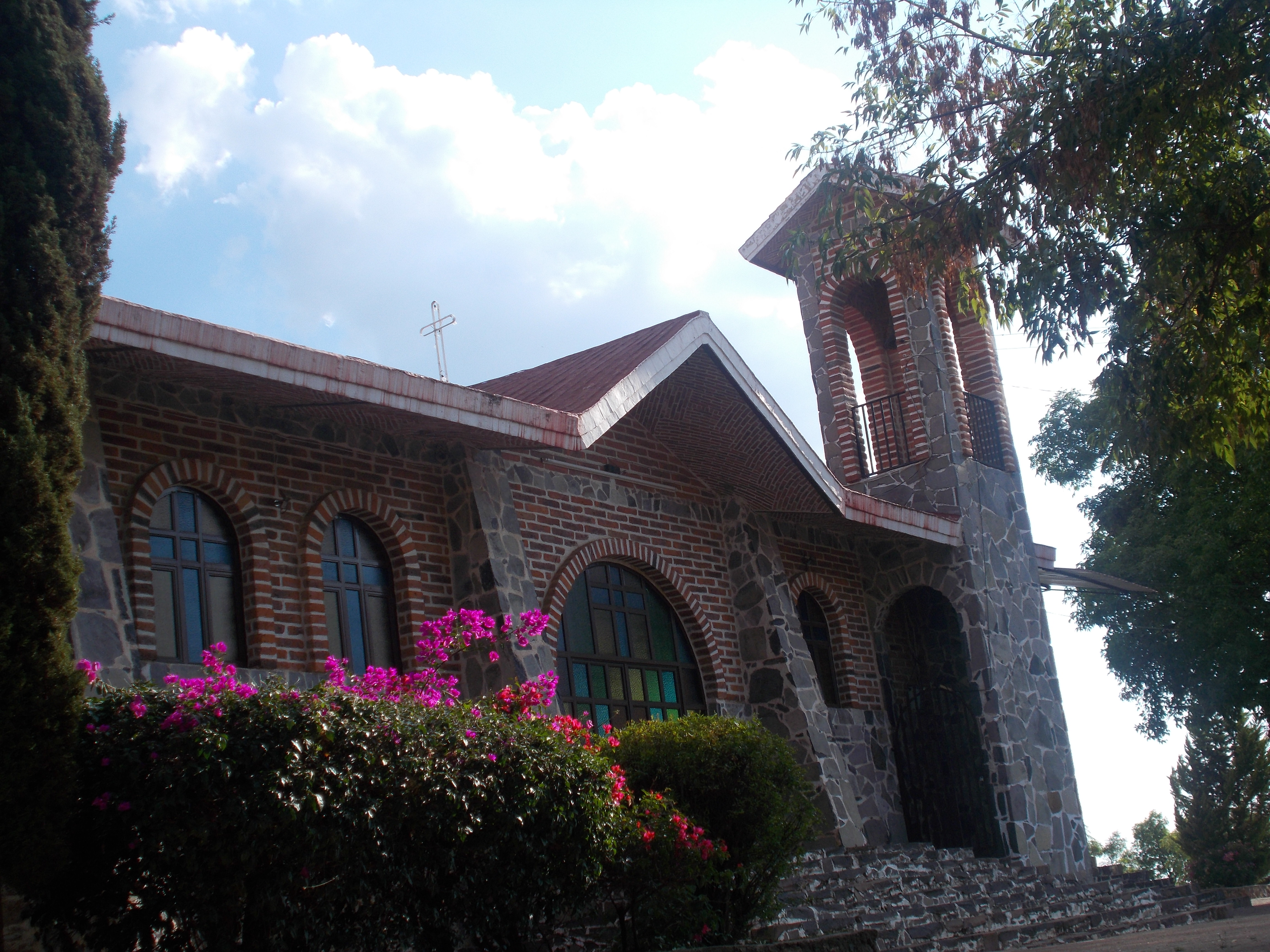 Templo del Señor del Perdón Los Sauces